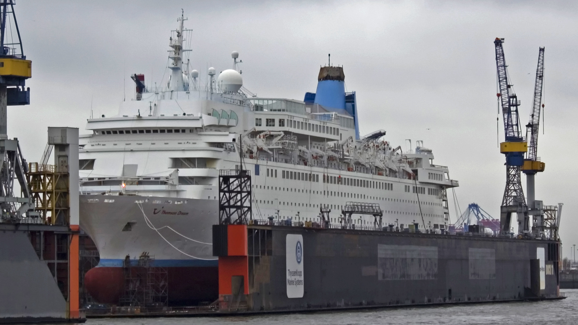 MS Thomson Dream bei Blohm und Voss in Hamburg am 23 November 2010